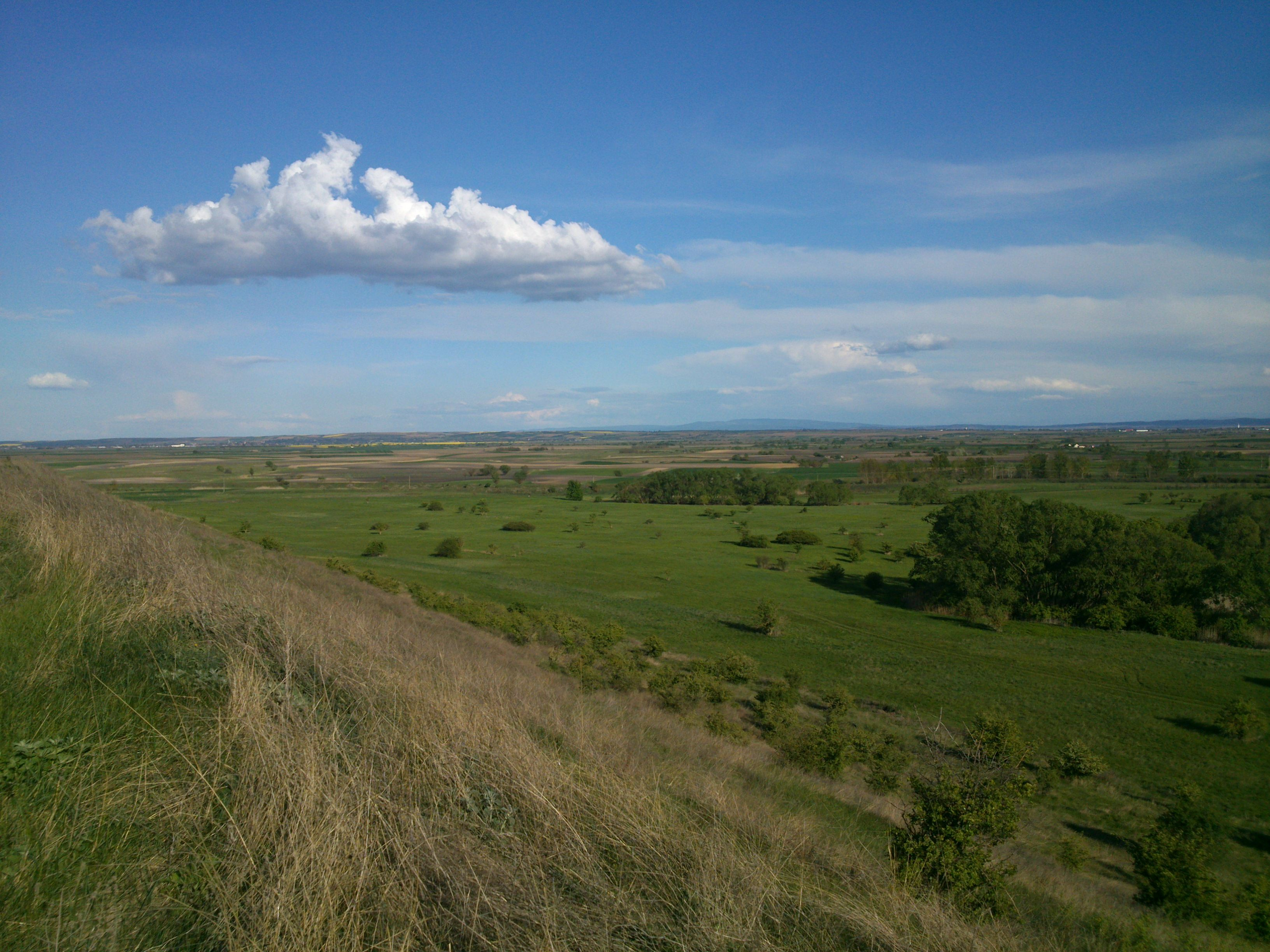 Partalja2